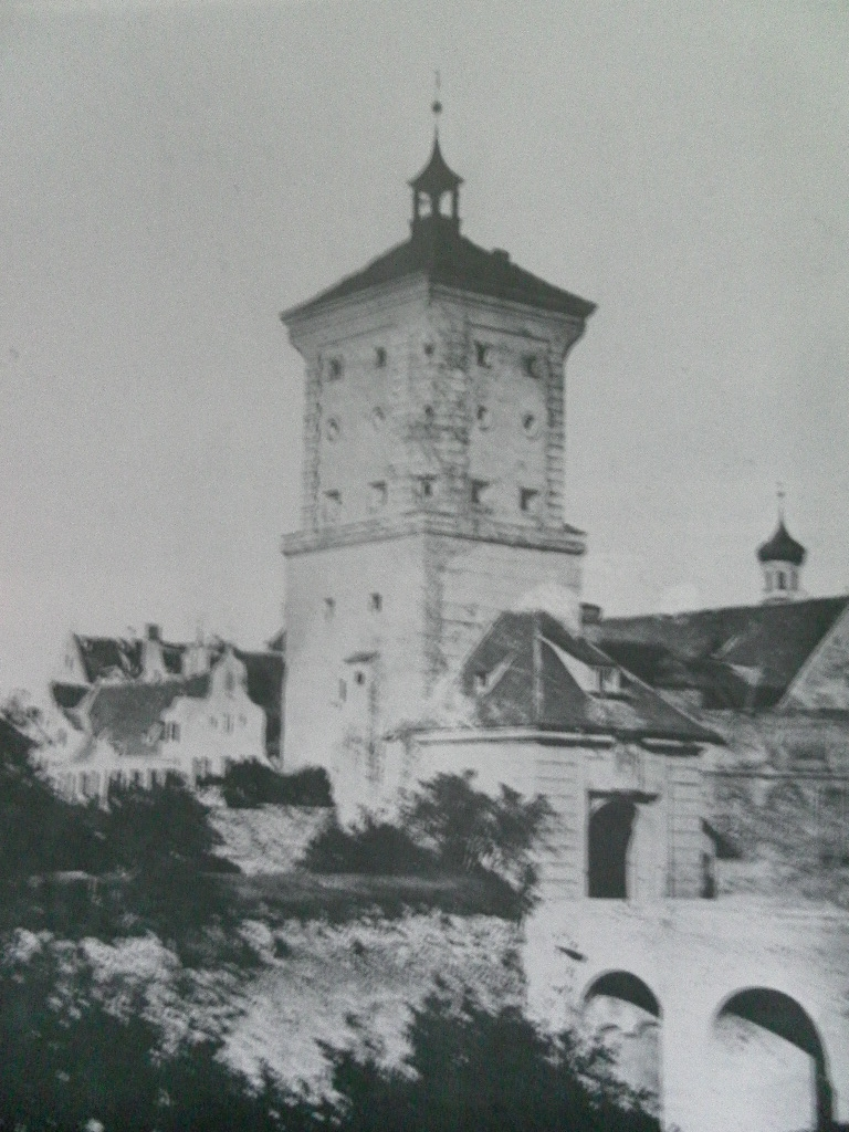 Das Klinkertor